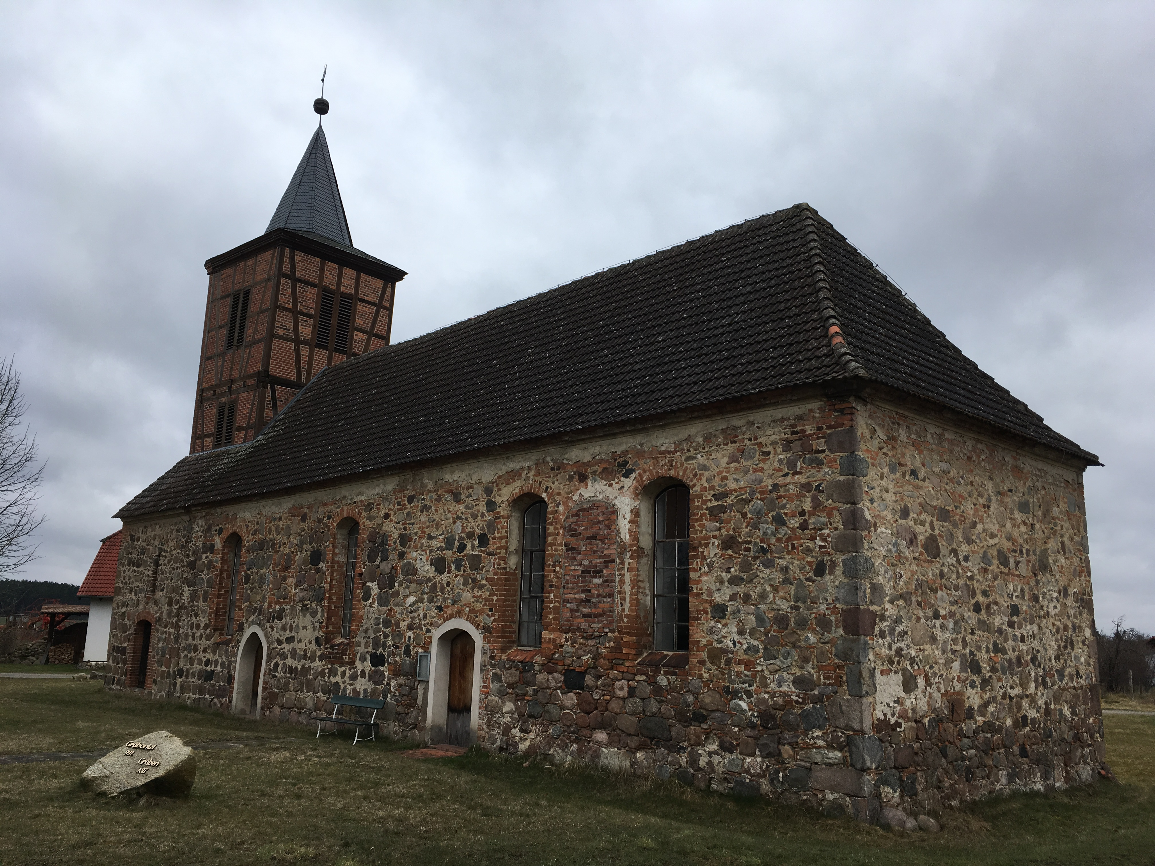 Die Dorfkirche in Gräben ist eine Feldsteinkirche, die vermutlich im 14. Jahrhundert entstand.